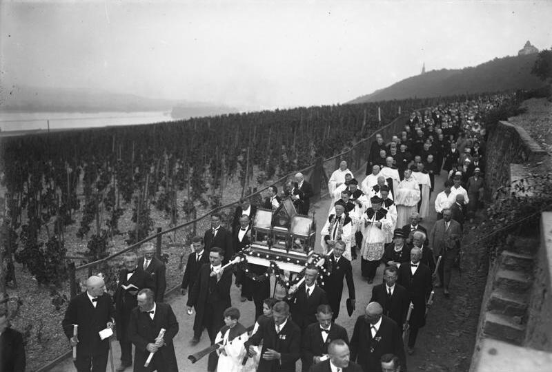 Hildegardesfest am Mittelrhein! Die Gebeine der "Heiligen Hildegard" von Bingen werden im Schrein der Prozession vorangetragen. Im Hintergrund der Rhein.